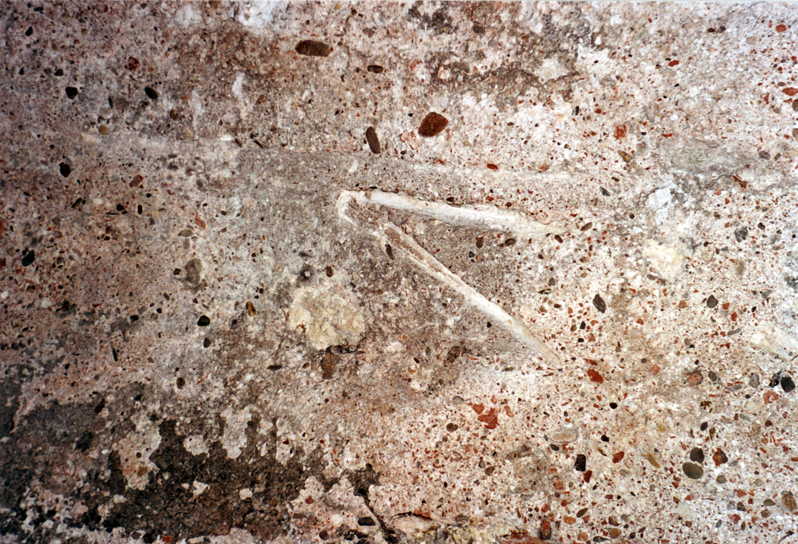 Trier, Kaiserthermen – Verschalte Decke im unteririschen Sektor mit dem Abdruck eines beim Einguß vergessenen Zirkels, der erst bei der Abnahme der Verschalung wiedergefunden wurde.